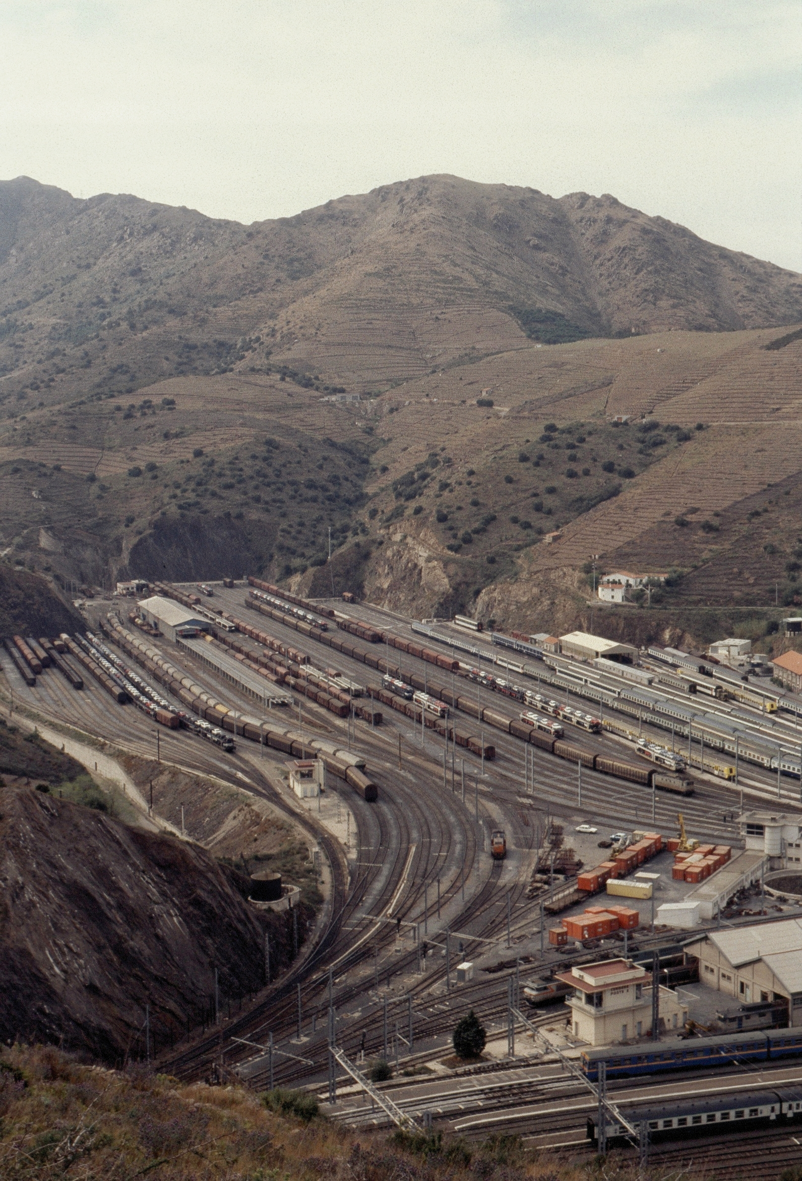 Cerbère, gare de marchandises